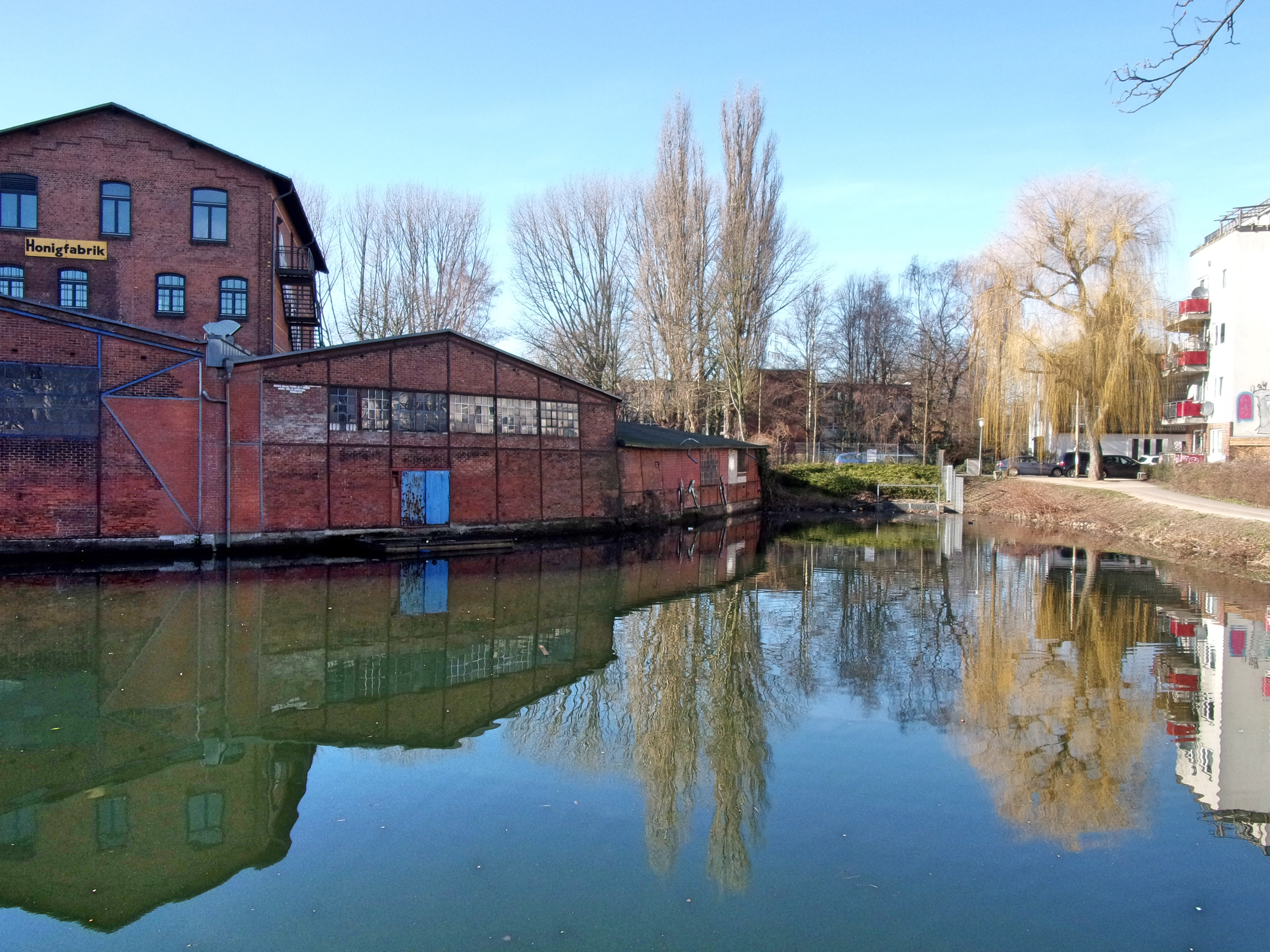 Nordende des Veringkanals an der Honigfabrik in Wilhelmsburg am Sanitaspark. This is a photograph of an architectural monument.